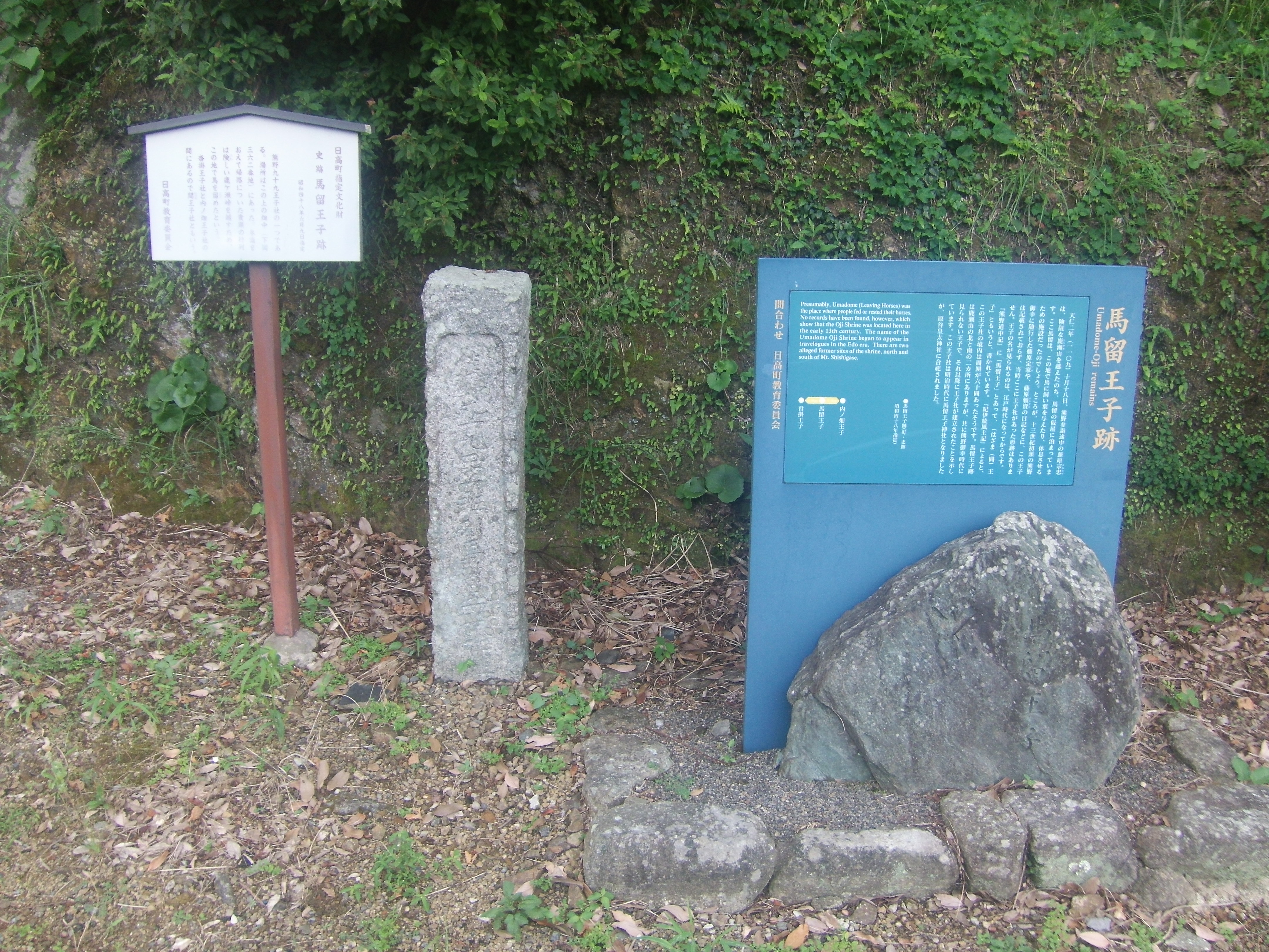 熊野古道・紀伊路の九十九王子の一つ西の馬留王子跡(和歌山県日高町）